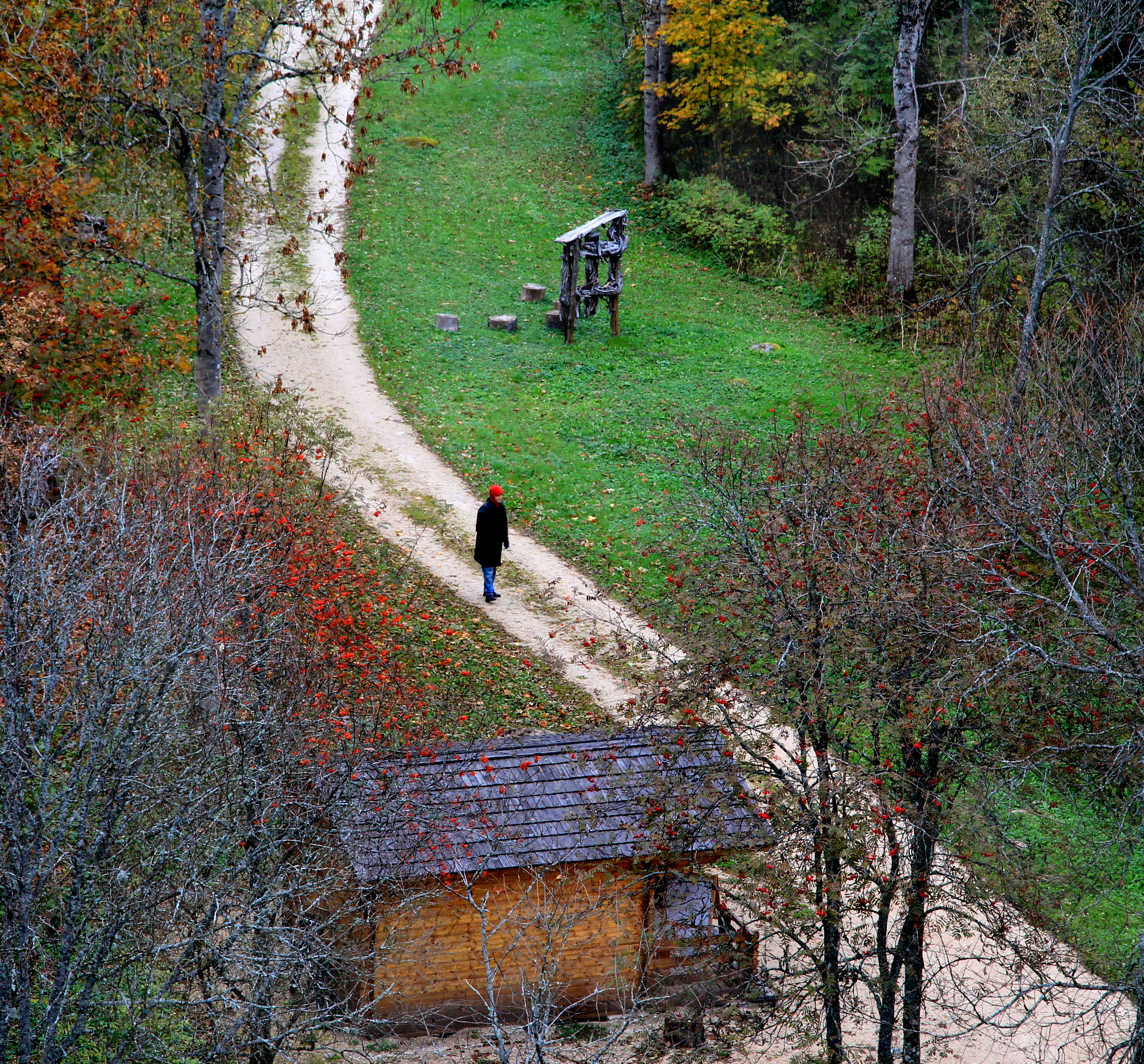 Vaade Emumäe torni pääsla kassale